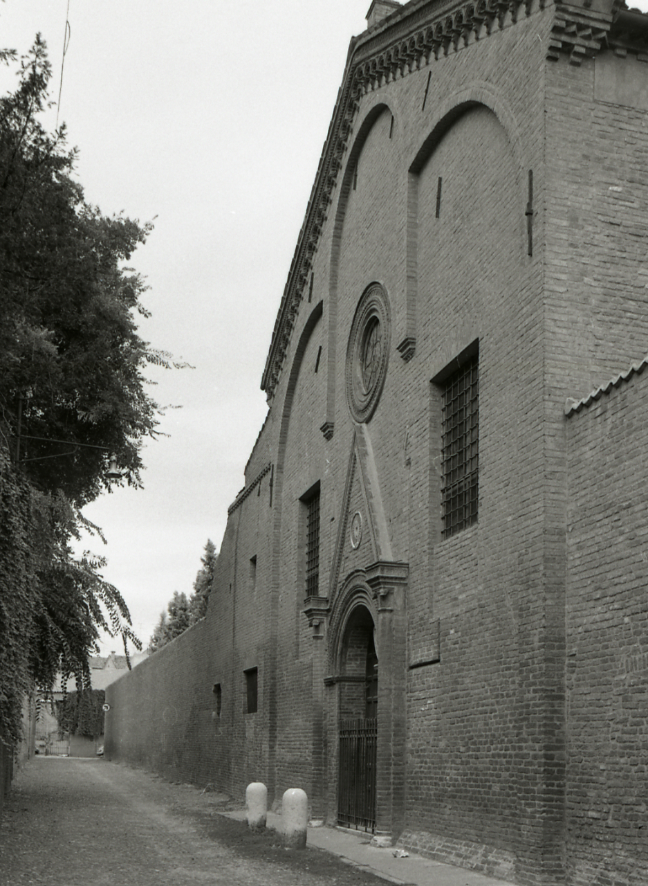 Servizio fotografico : Ferrara, 1974 / Paolo Monti. - Strisce: 7, Fotogrammi complessivi: 37 : Negativo b/n, gelatina bromuro d'argento/ pellicola ; 35 mm. - ((Sul portanegativi: N[I]K[MA]T FP4. - Occasione: Documentazione del centro storico. - Fonte: Agenda di Paolo Monti: Leica 1501-3000 Controllo numerazione (1950-1978), presso Archivio Paolo Monti. - Fonte: Fattura di Paolo Monti: IV. Commesse/ Fattura n. 18/ Riprese fotografiche del centro storico (Mostra Vitalità del centro storico) (1974/10/16), presso Archivio Paolo Monti